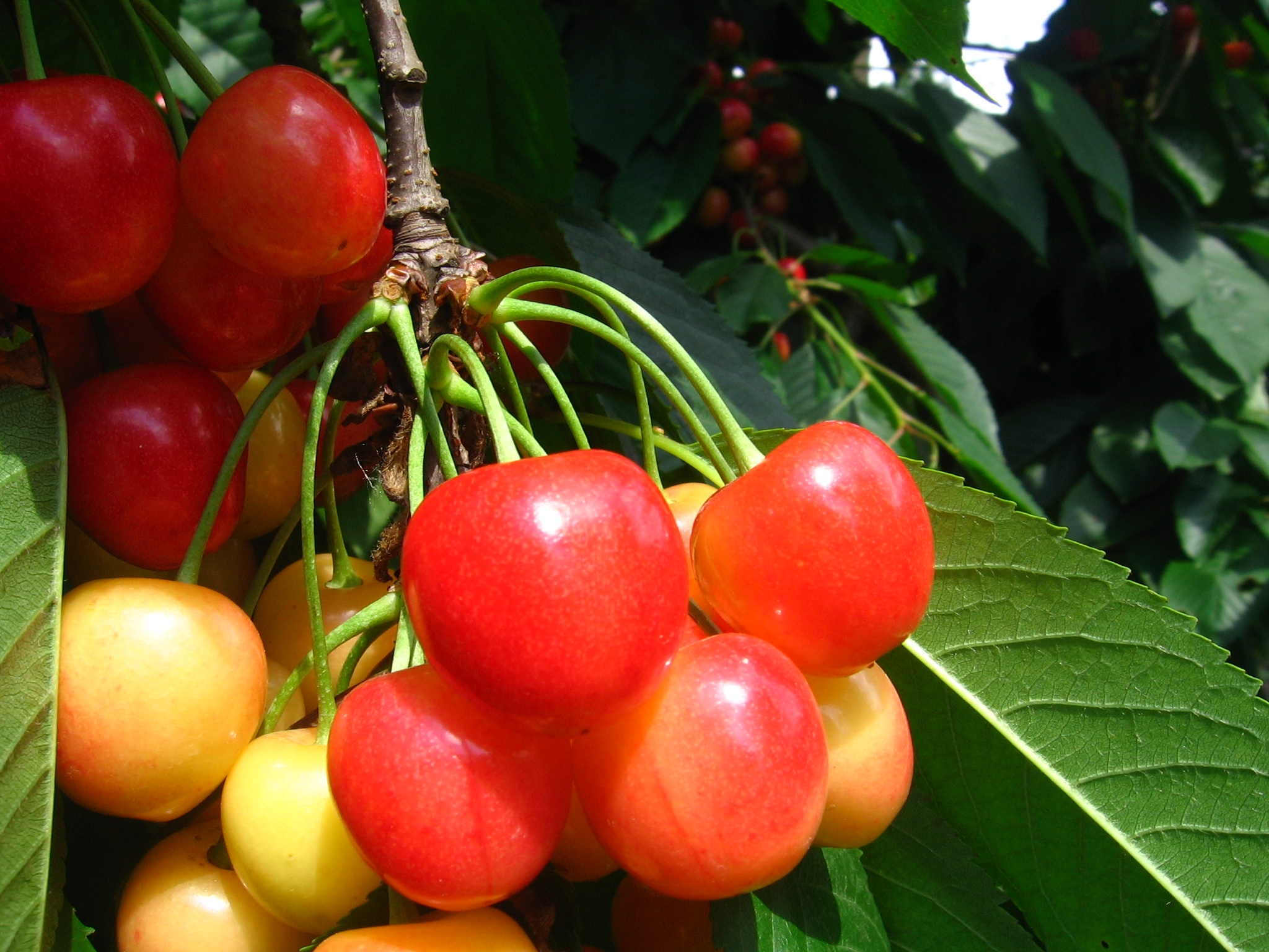 Czereśnie